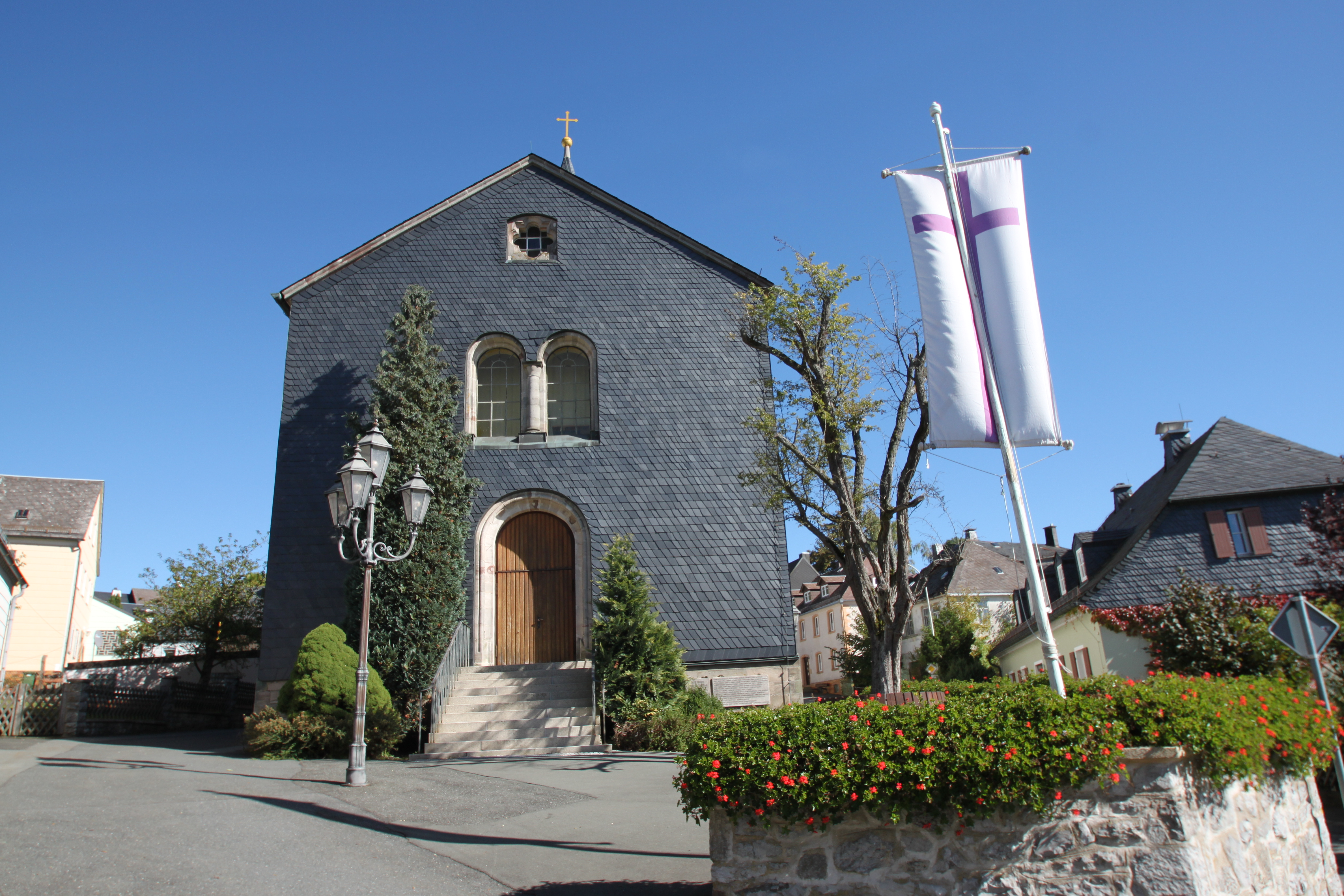 Michaeliskirche in Bernstein am Wald mit kunstvoller Innenausstattung aus dem 17. Jahrhundert